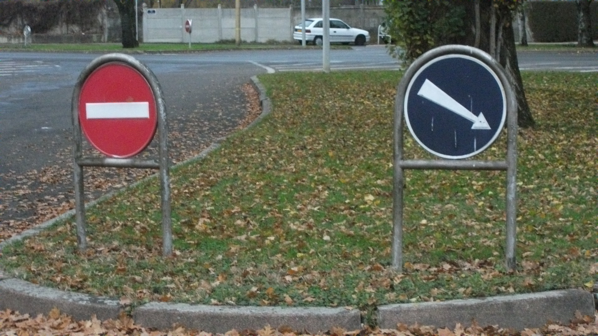 Anciens panneaux B1 et B21a1 au carrefour du boulevard de la Résistance et de l'allée des Ailes.